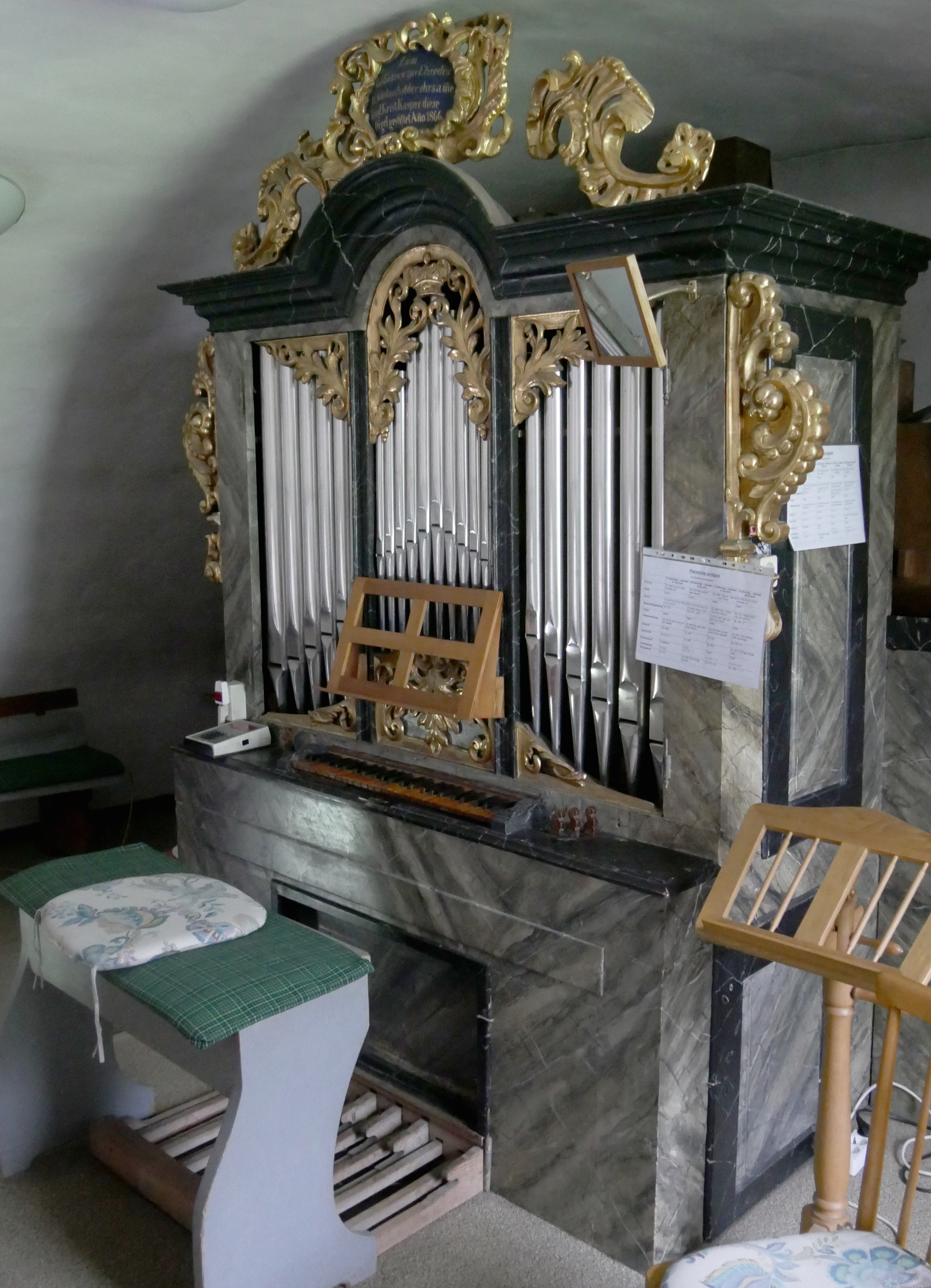 Orgel der Kirche in Gortipohl (Vorarlberg /Österreich)